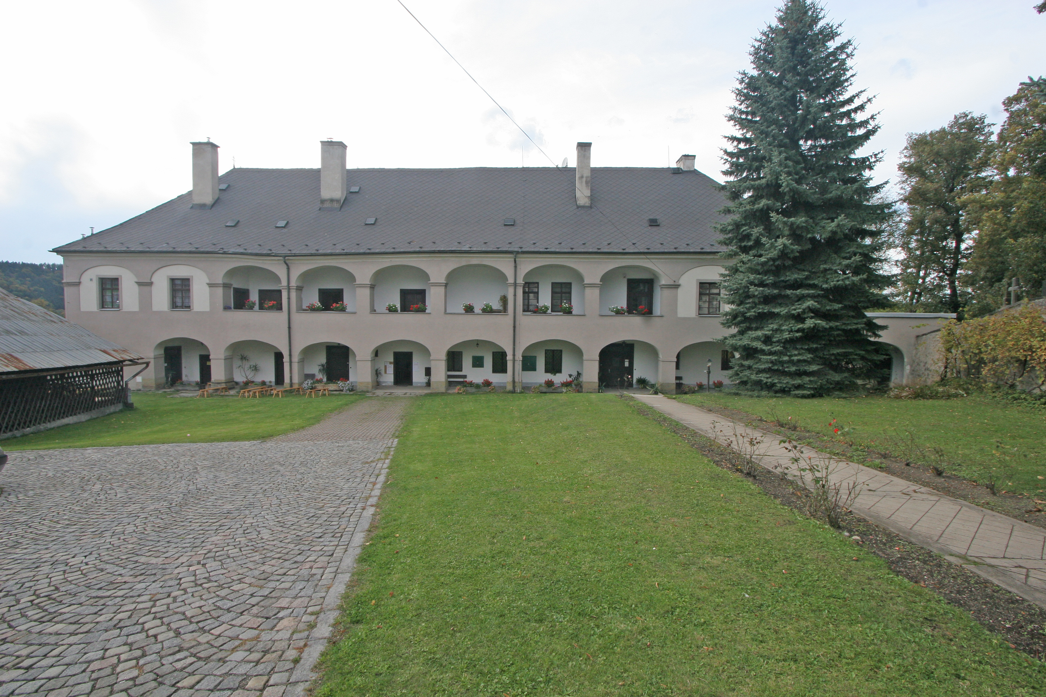 Děkanství (Ústí nad Orlicí), Kostelní 19, Ústí nad Orlicí